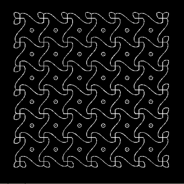 Drawn by mayooranathan